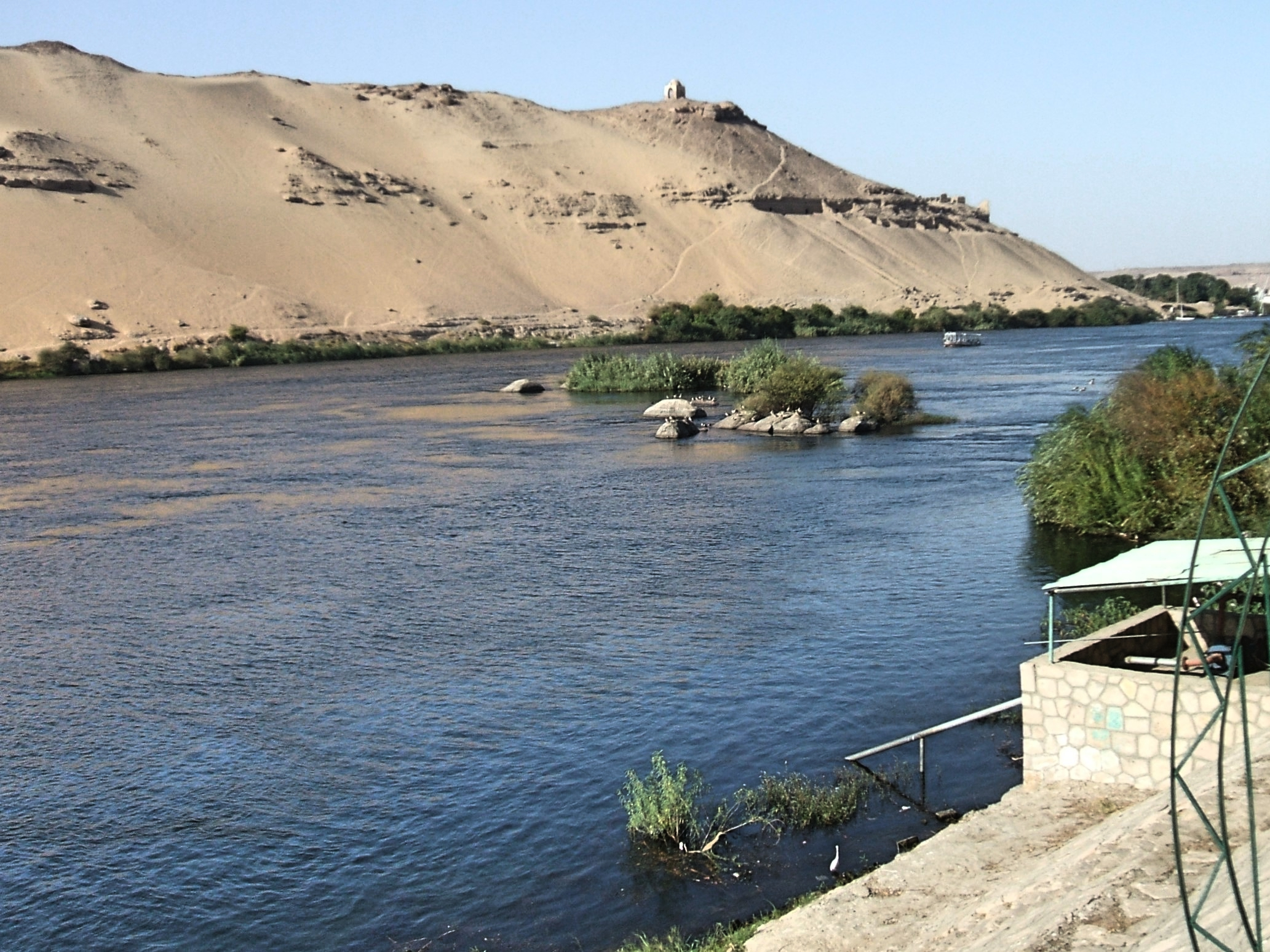 Rive occidentale du Nil à Assouan, Egypte This is an image with the theme "Africa on the Move or Transport" from: Egypt